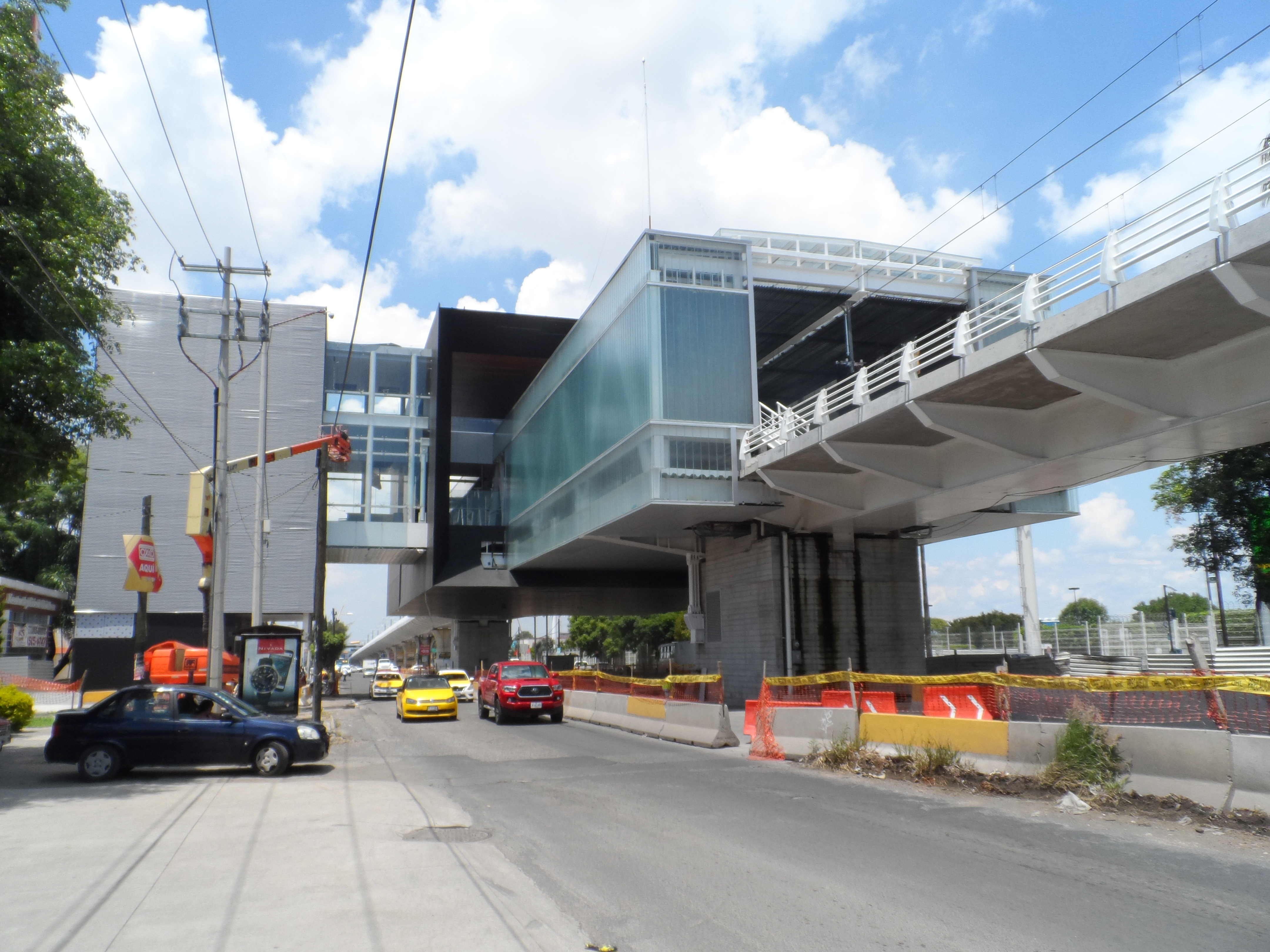 Vista externa de la estación "Lázaro Cárdenas" de la Línea 3 del Tren Ligero de Guadalajara.